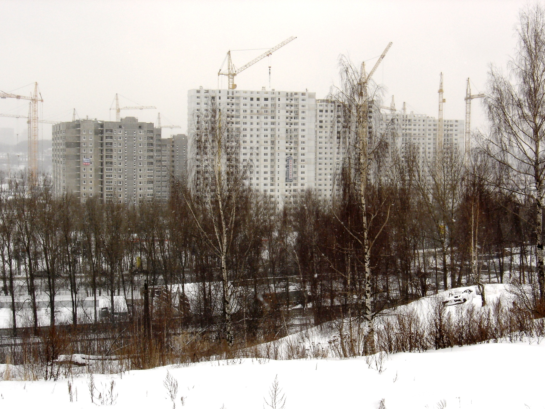 Павшинская пойма (2005 г.)